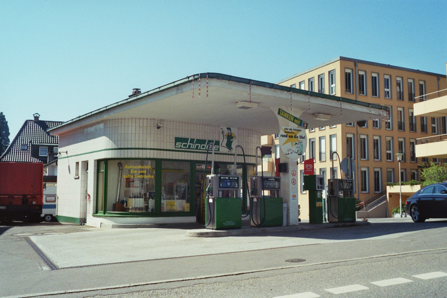 Denkmalgeschützte Tankstelle Schindele an der Ecke Friedrich- Werastraße 18 in Friedrichshafen. Erbaut: 1949